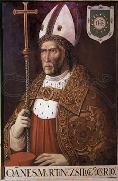 Retrato del Arzobispo de Toledo, Cardenal Juan Martínez Guijarro (1477-1557)